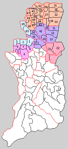 後の大阪府中河内郡域の町村制時点の町村。